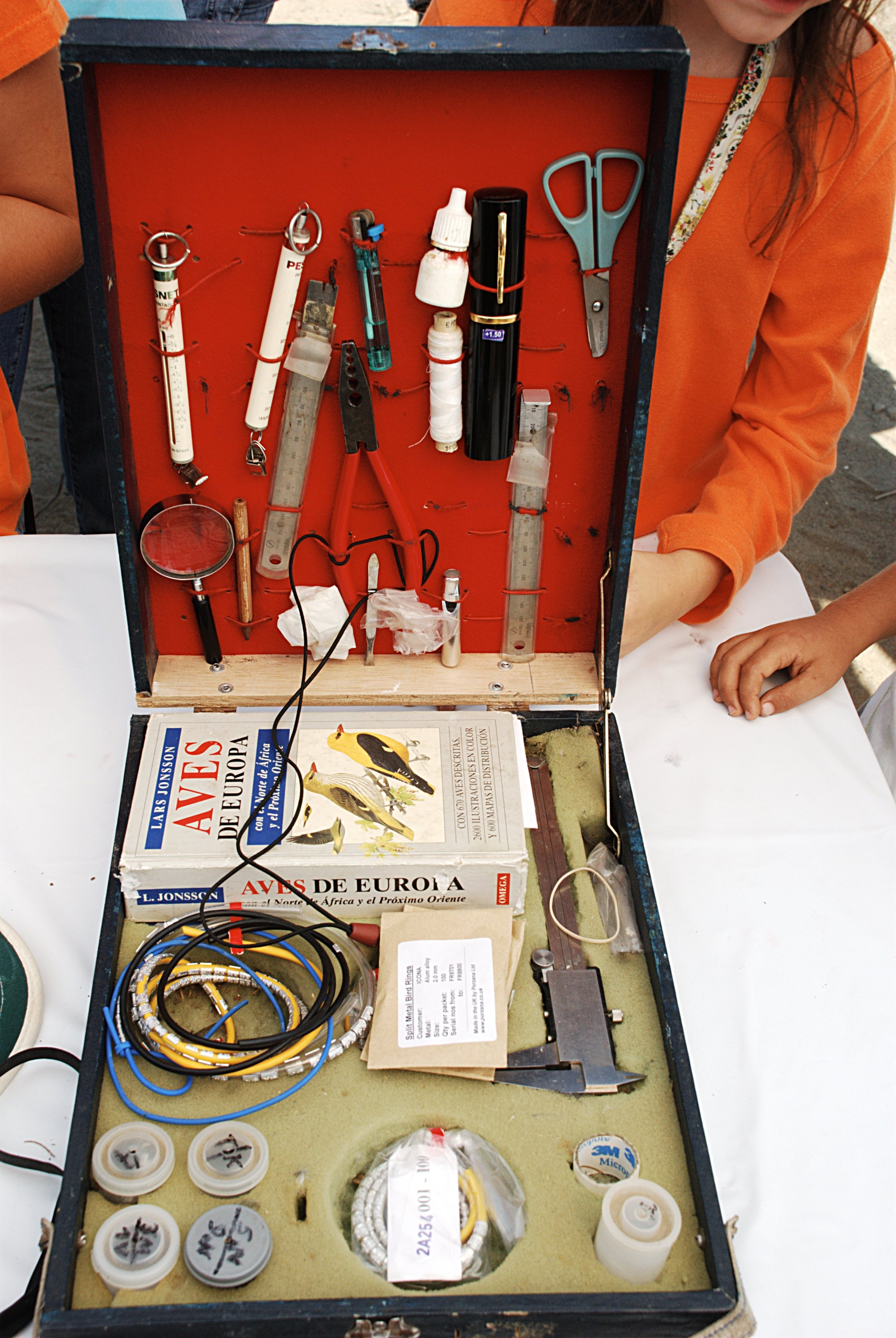 Todo lo necesario para poder anillar aves